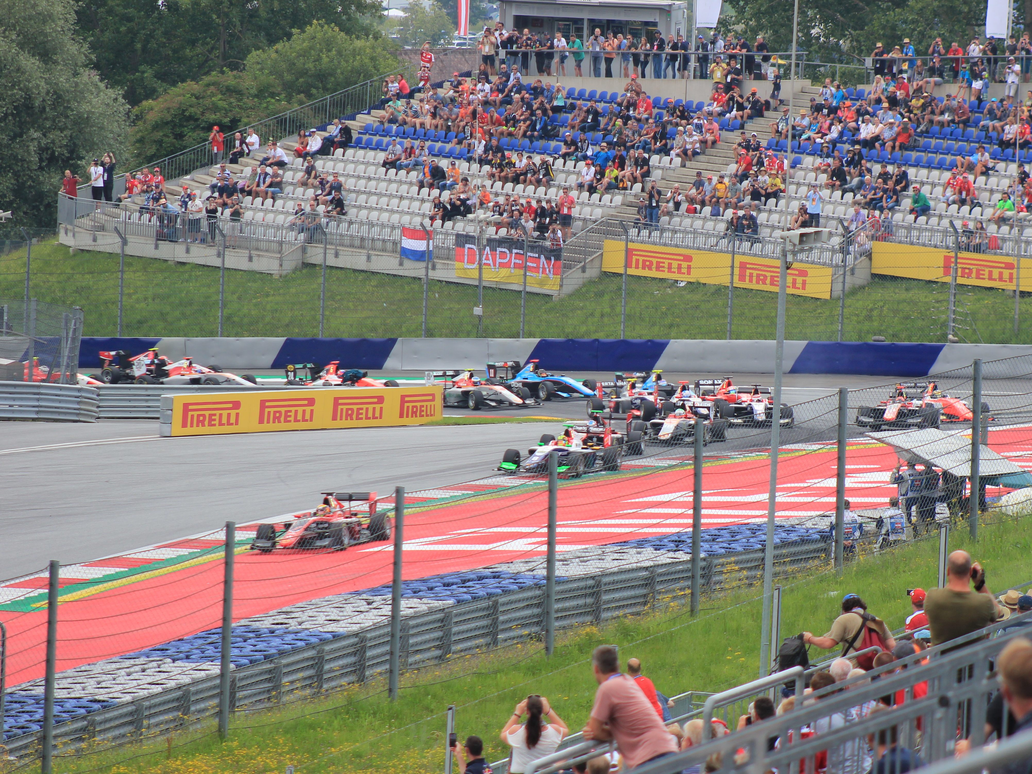 Rennstart beim ersten GP3-Rennen mit Ilott an der Spitze (man beachte rechts das wheelbanging zwischen Mazepin und Boccolacci)